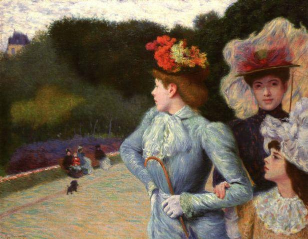 Promenade